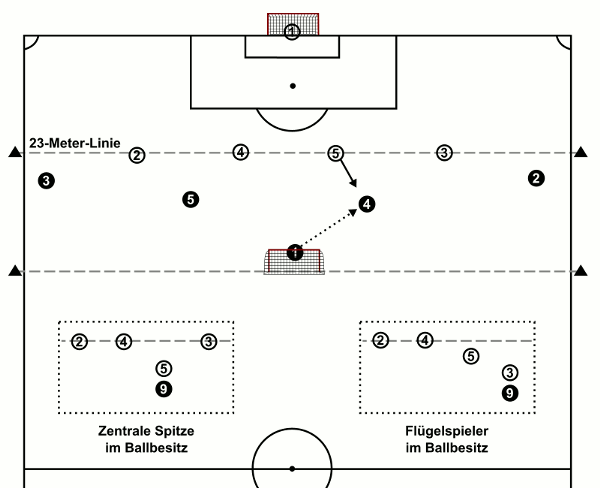 Verhalten der Viererabwehrkette beim Angriff der gegnerischen Mannschaft